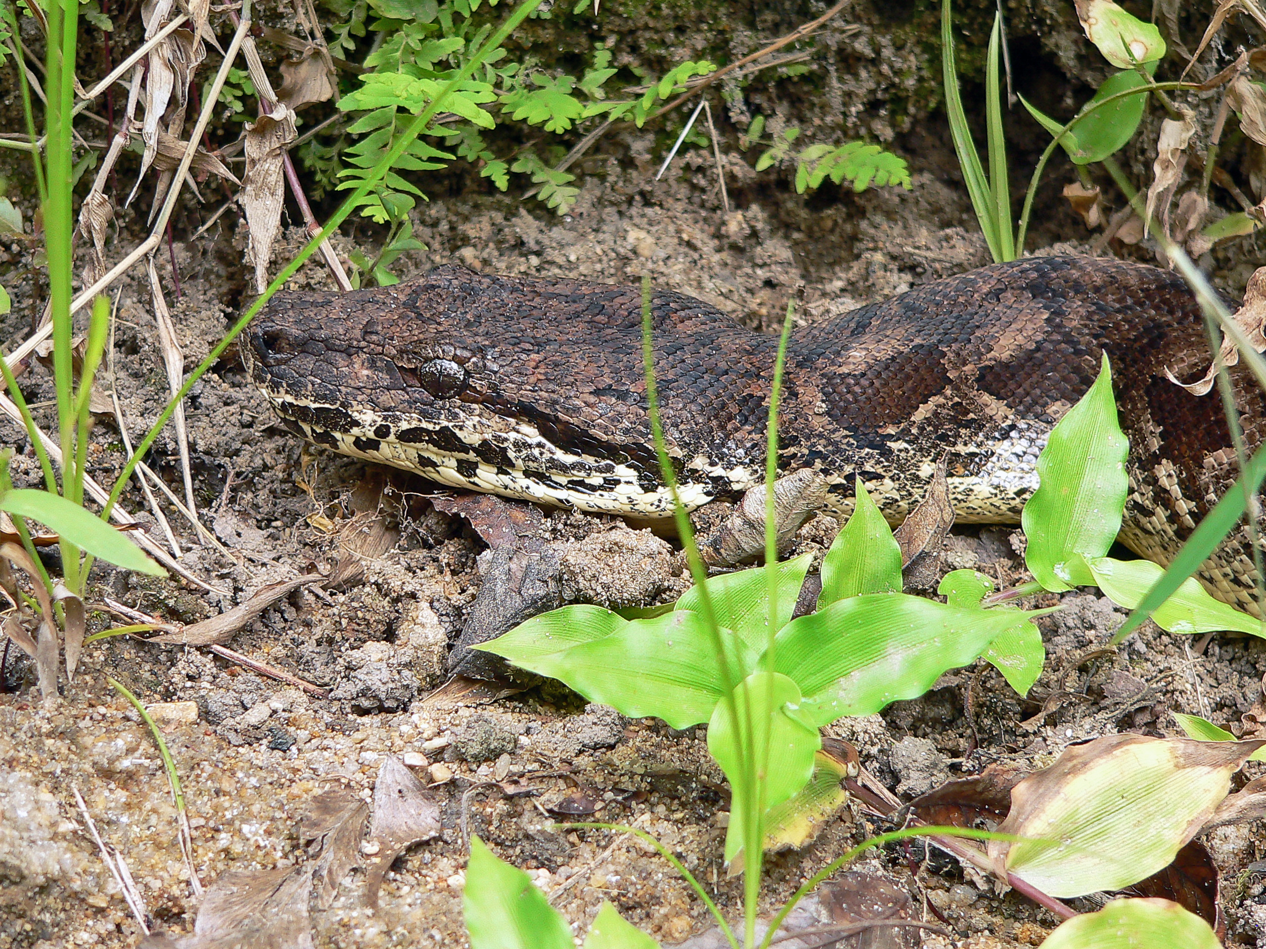 Acrantophis dumerili; Isalo National Park, Namaza Valley